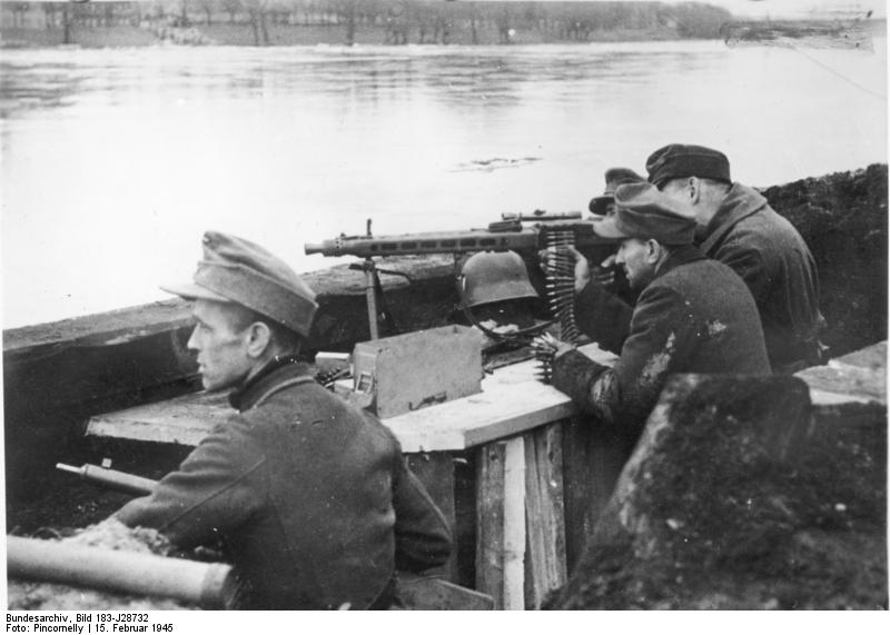 Scherl: Der Kampf gegen die Sowjets Überall wo es notwendig wurde, haben Männer des Volkssturms die Verteidigung des Heimatbodens mit übernommen. Eine MG-Stellung des Volkssturms am Ufer der Oder. PK-Kriegsberichter Pincornelly. 15.2.1945 [Aufnahmedatum] ADN-ZB Deutsch-sowjetische Front bei Frankfurt/Oder am 15.2.1945: Eine MG-Stellung des "Volkssturms". Hitlers letztes Aufgebot am Ufer der Oder.